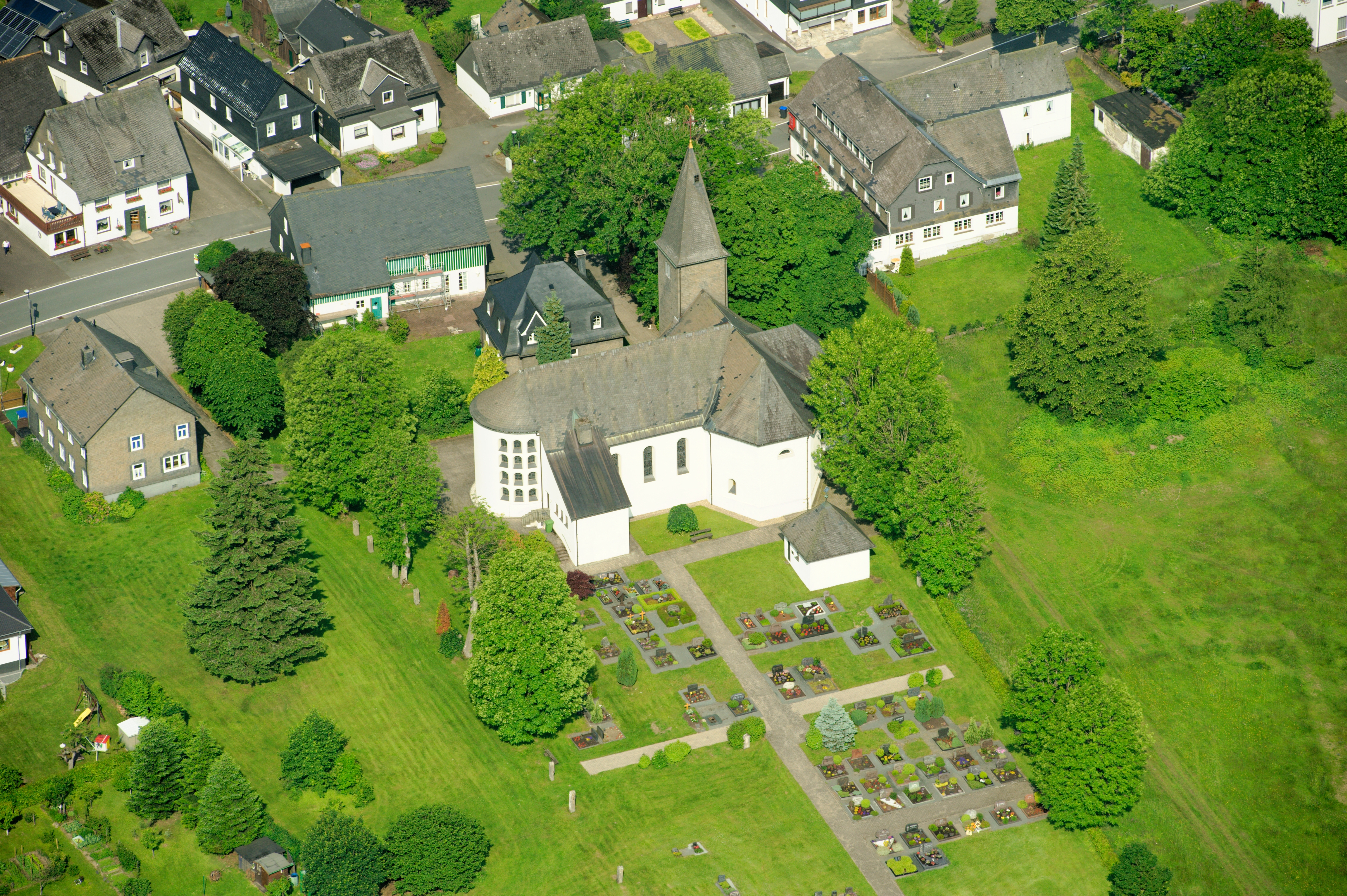 Fotoflug Sauerland-Ost, Winterberg-Neuastenberg, St. Laurentius